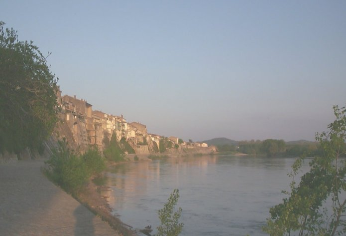 Soleil du soir sur le front de Garonne à Tonneins.